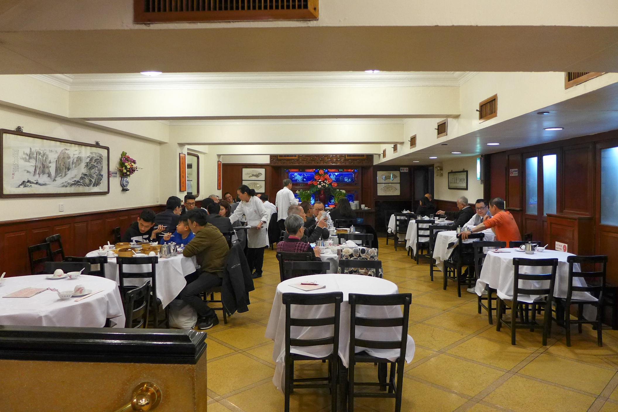 Luk Yu Tea House Level 1